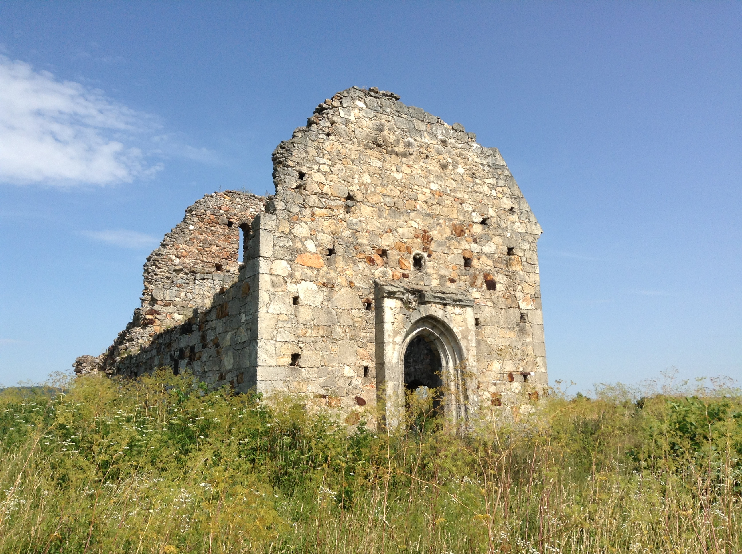 Руїни костелу Святого Іоанна Хрестителя, село Мужієво (Nagymuzsaly), Закарпатська область, Україна. Ruins of the St. John the Baptist's Cathedral, Muzhievo (Nagymuzsaly), Zakarpattia Oblast, Ukraine.